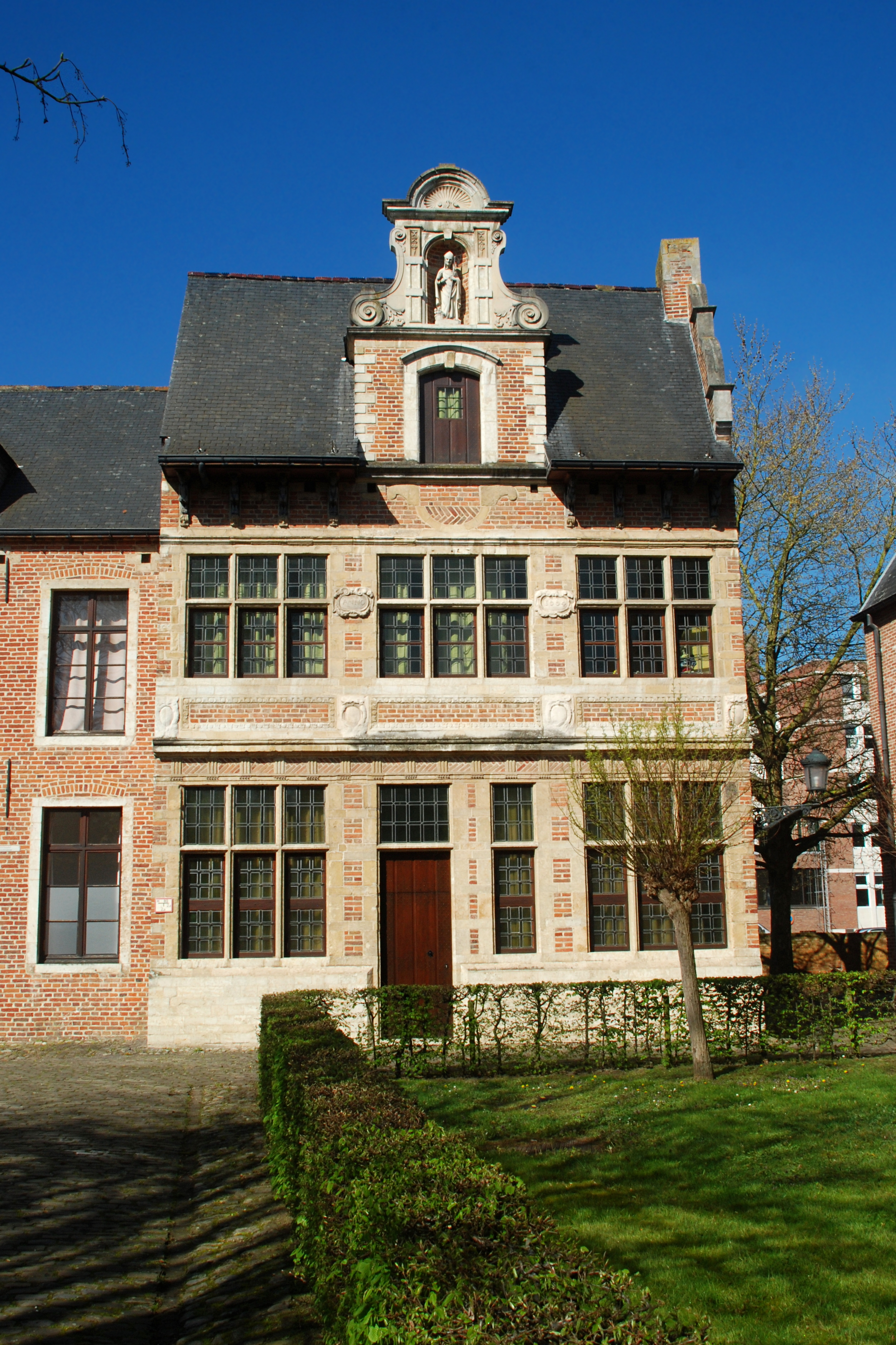 Belgium - Leuven - Groot Begijnhof - Maison Saint-Nicolas - Benedenstraat n° 59